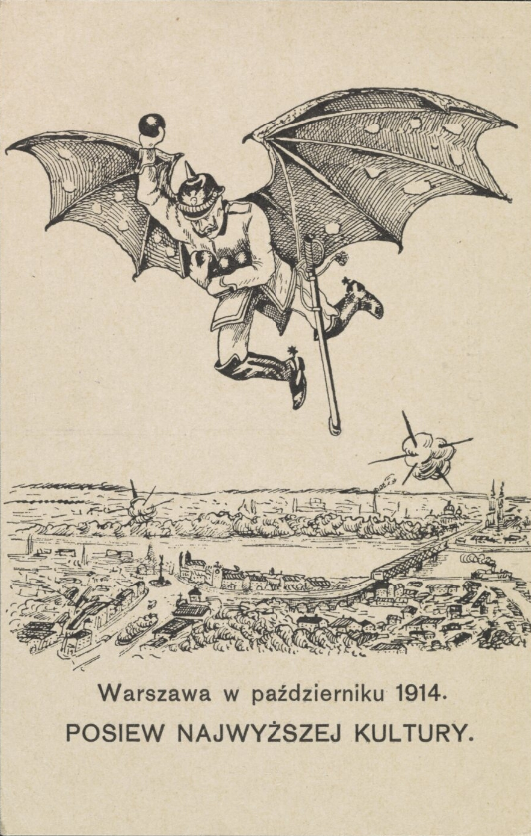 Karykatura polityczna Posiew najwyższej kultury. Warszawa w październiku 1914 o bombardowaniu miasta przez Niemców.